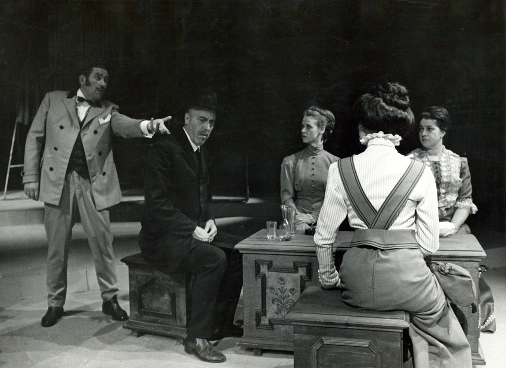 Ivan Cankar, Hlapci, Drama SNG v Ljubljani. Na fotografiji: Jurij Souček (Komar), Aleksander Valič (Hvastja), Mojca Ribič (Lojzka), Ivanka Mežan (Minka), Vika Gril (Geni).